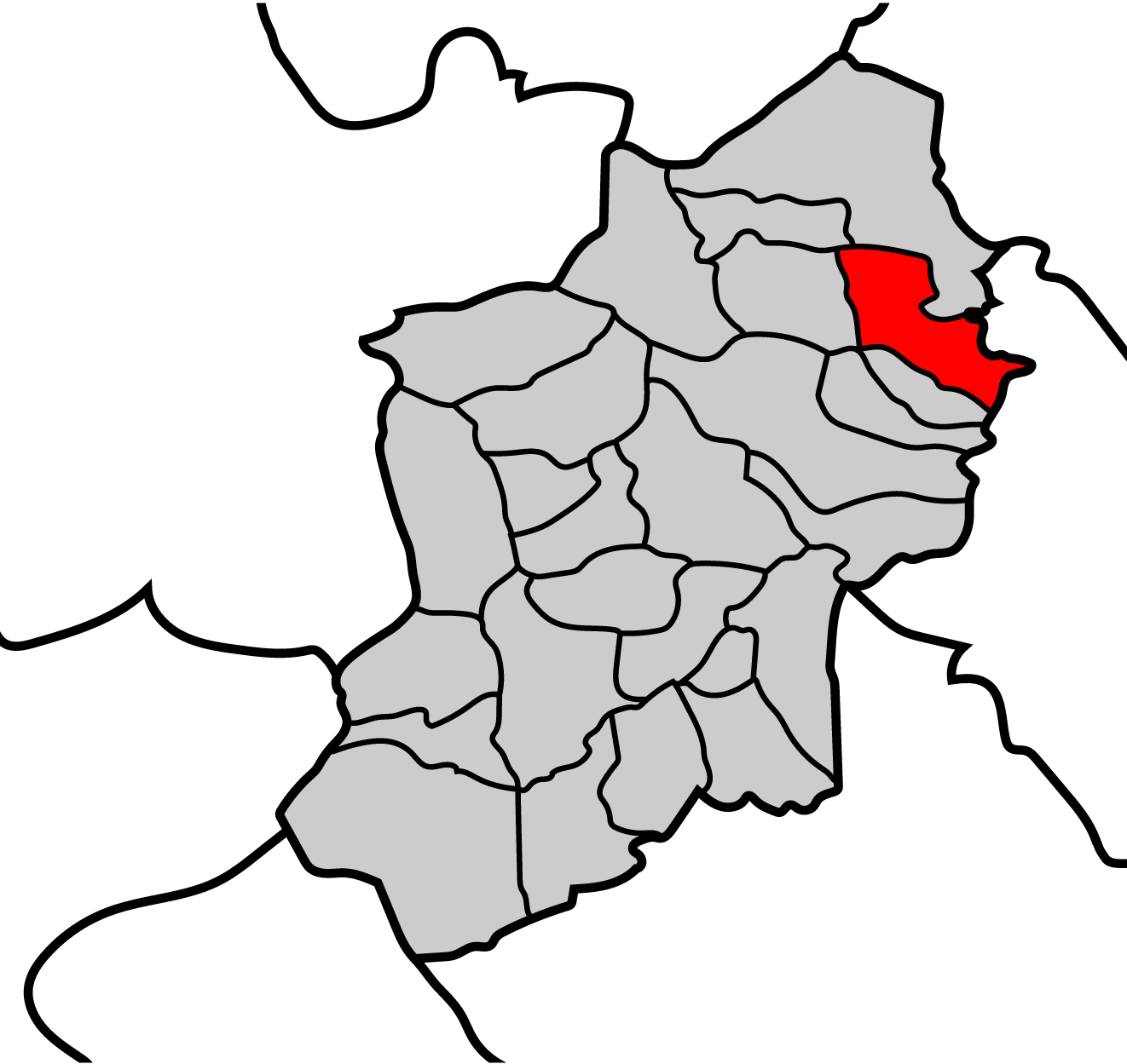 Mapa de la parroquia de Vilaíz ayuntamiento de Becerreá